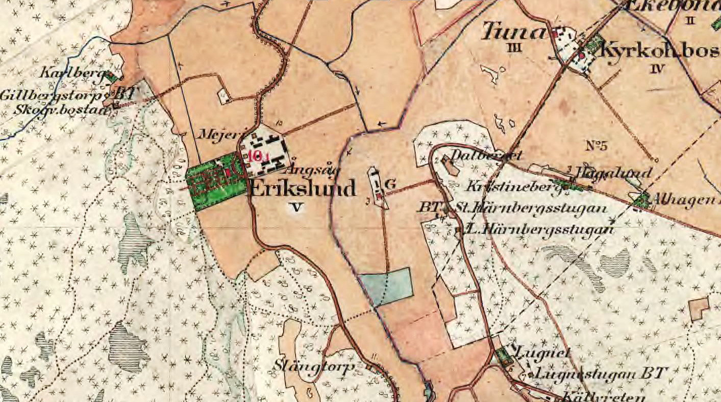 Erikslund på Häradsekonomiska kartan